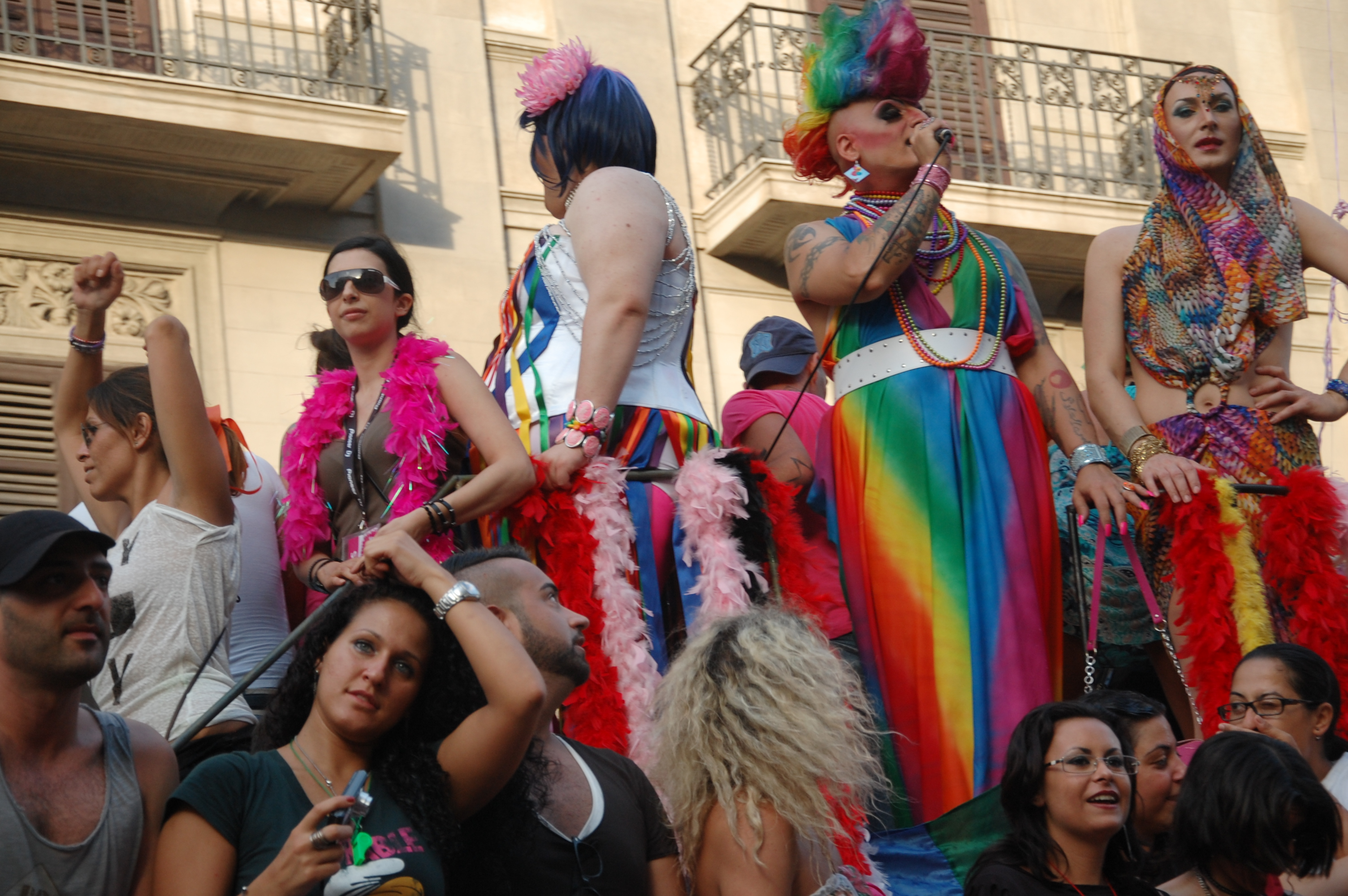 da ncaperciò